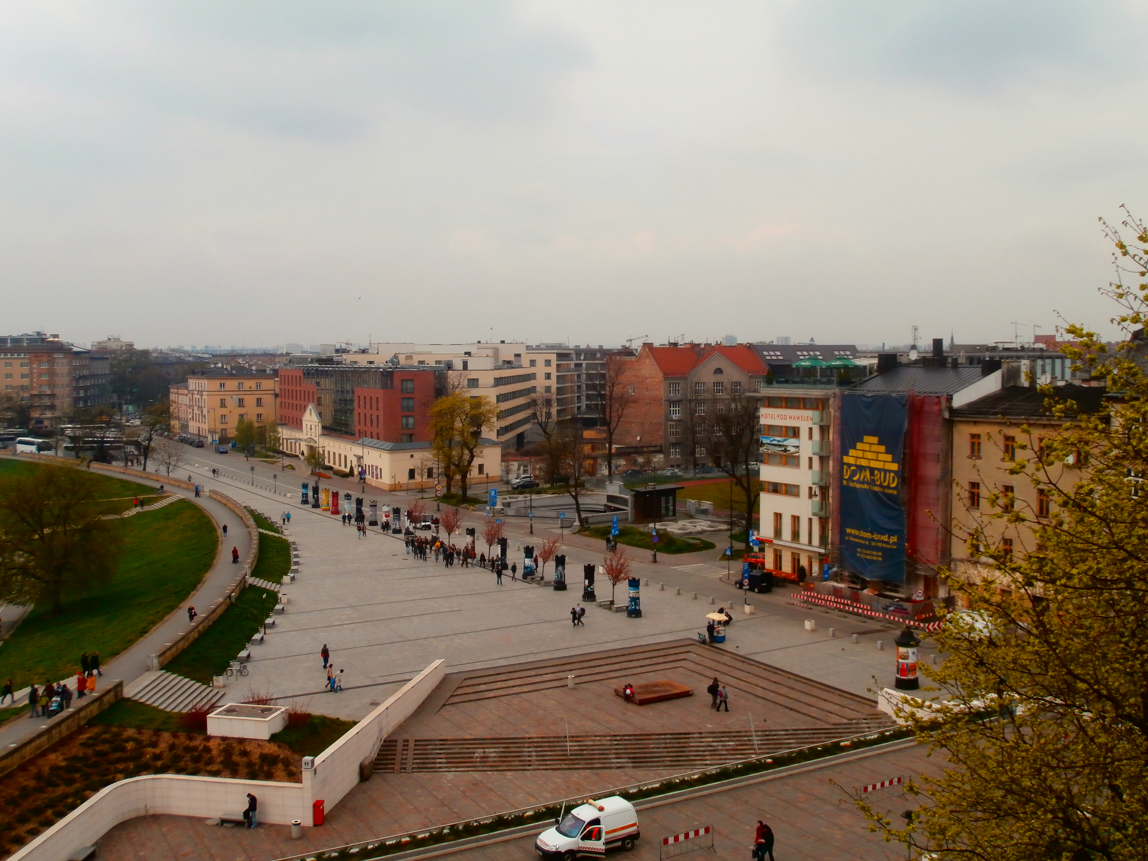 Widok na ulicę Powiśle w plac Na Groblach z Wzgórza Wawelskiego (Kraków).